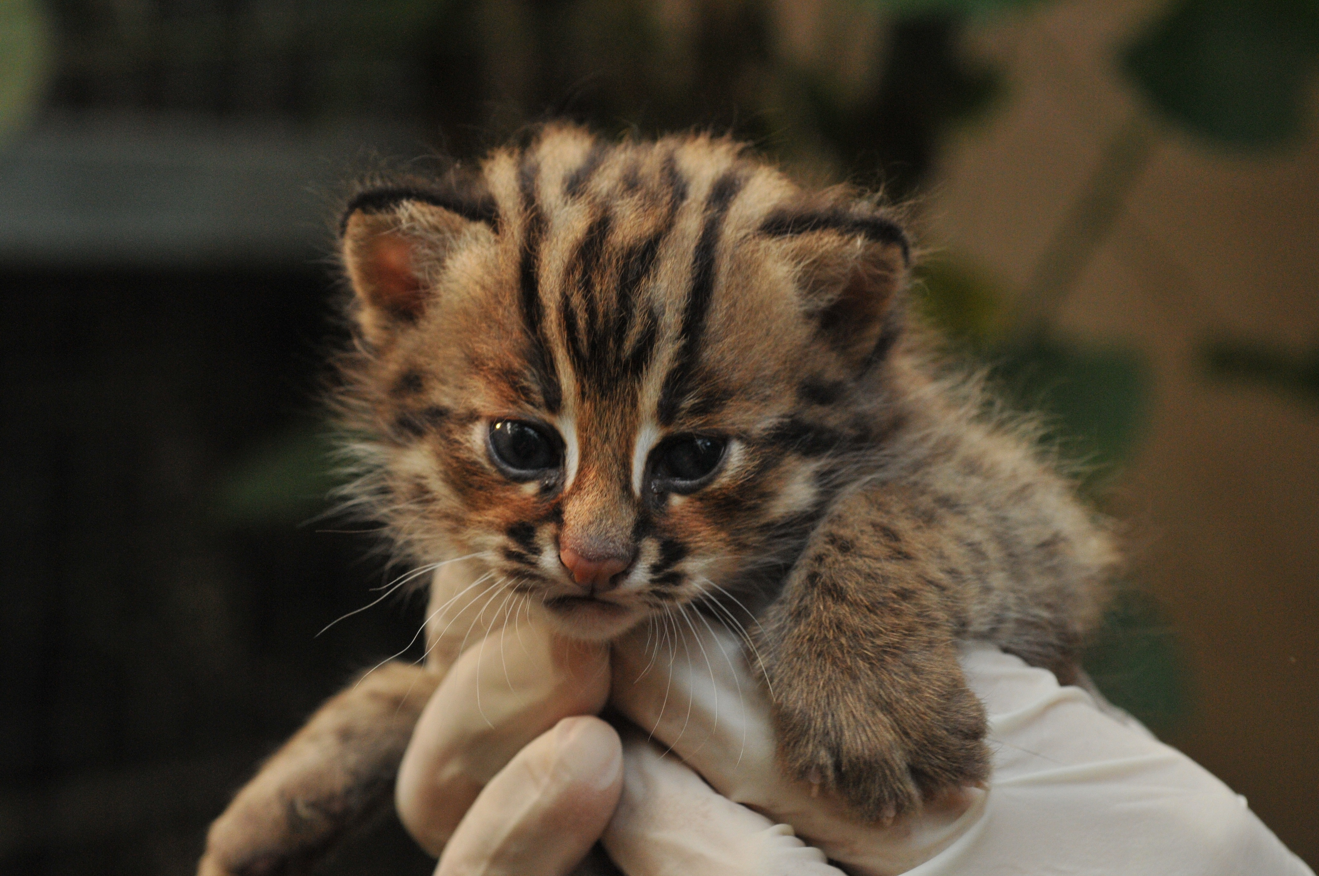 石虎在臺灣。